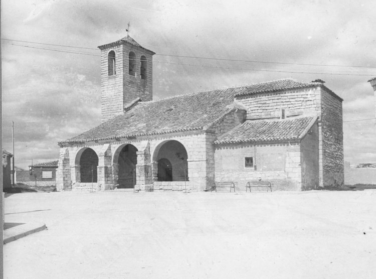 Iglesia parroquial de San Cristóbal - Marzales (Valladolid) - Álbum 200 x 140 - Fotografía. Papel 120 x 90 B/N